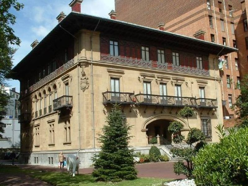 El Palacio de Ibaigane.